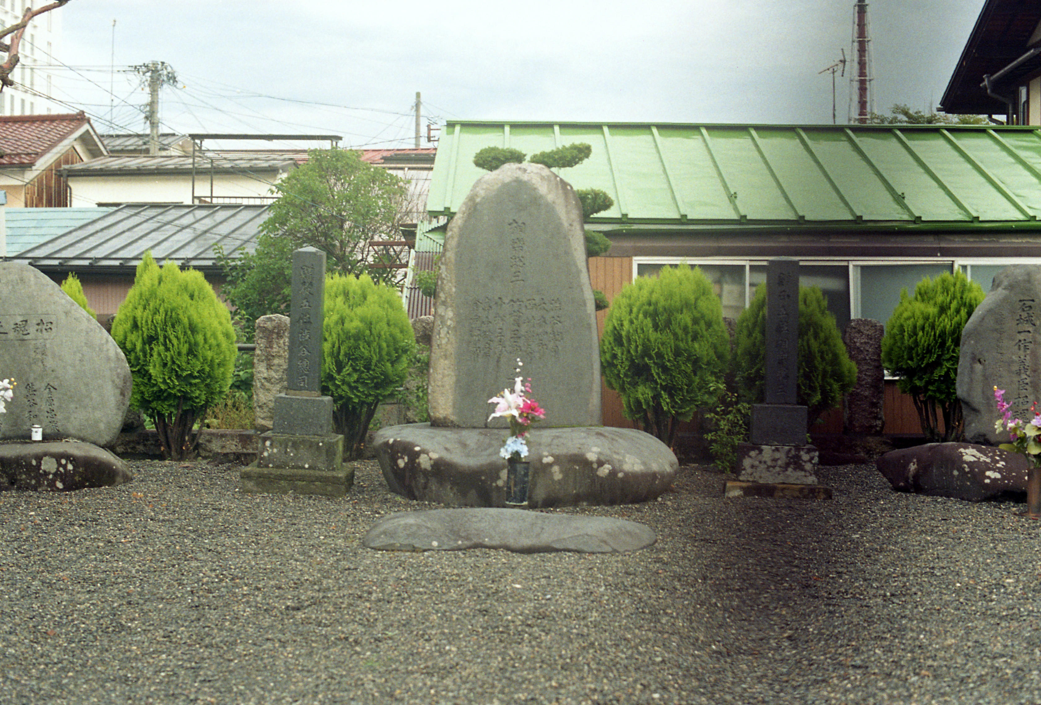 魁塚（相楽塚）